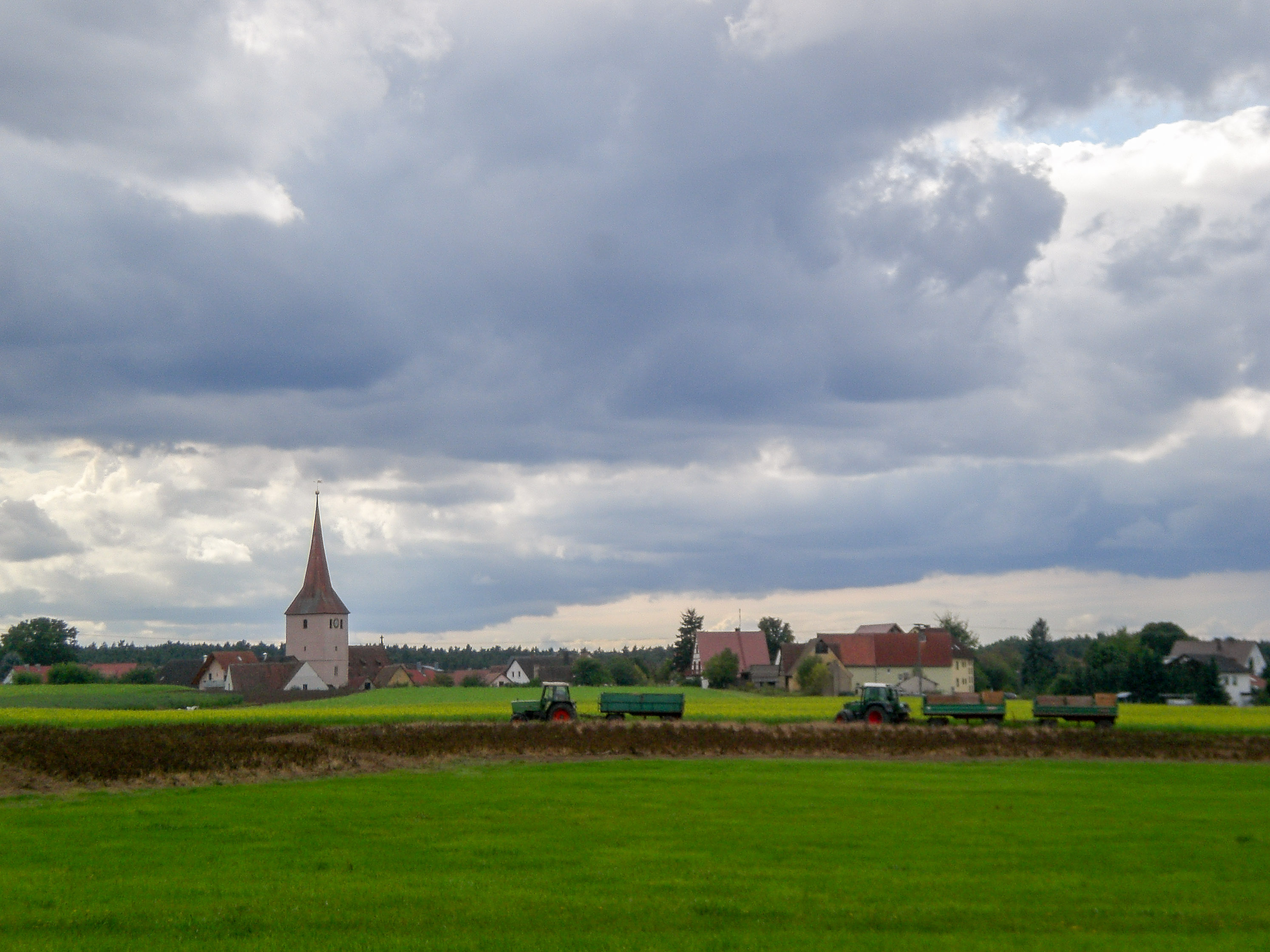 Leerstetten, Landkreis Roth, Ortsansicht